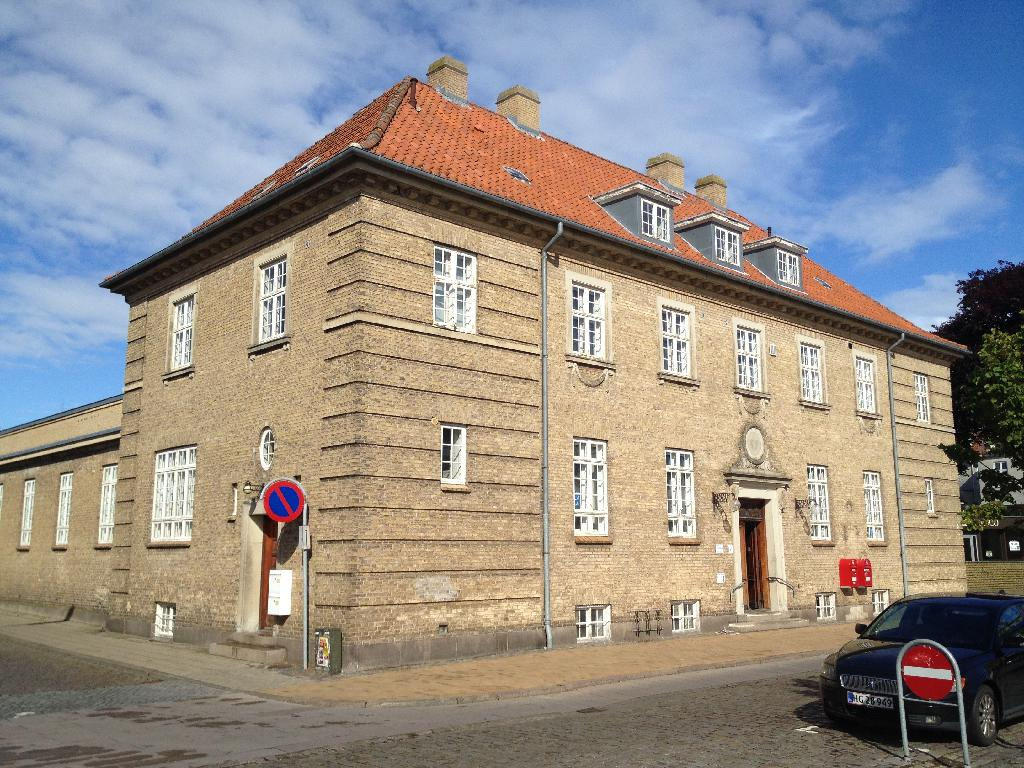 Haderslev Posthus, Gravene 8, Haderslev, Dänemark.